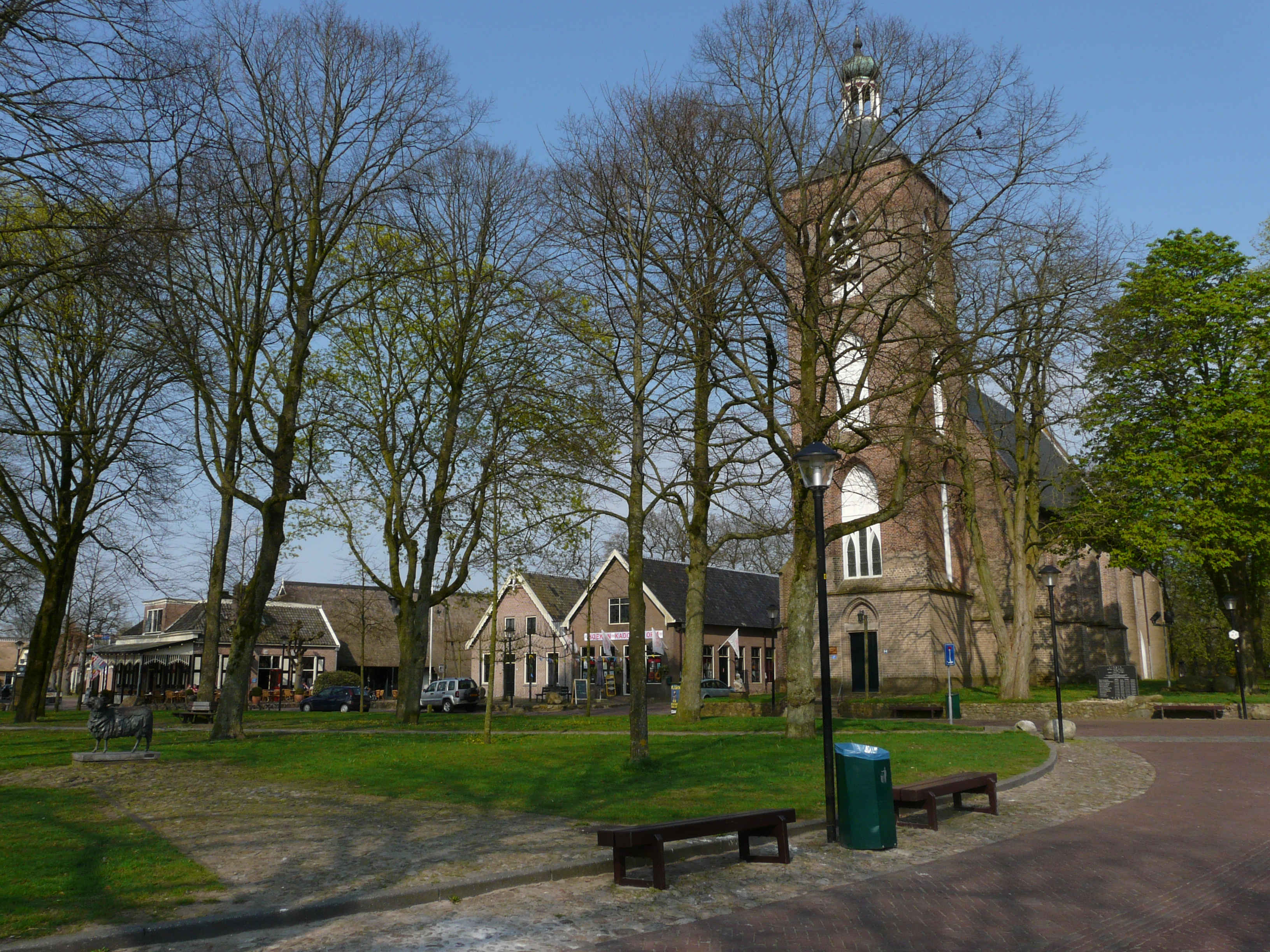 Zicht op een deel van de Brink en de Mariakerk in het centrum van Ruinen